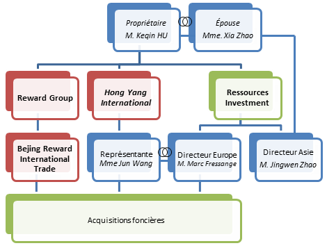 Sur l'organigramme, les personnes physiques sont représentées en bleue, avec les éventuels liens de parentés entre eux (mariage) Les sociétés étrangères à la France sont colorisées en rouge, tandis que les sociétés françaises le sont en vert.